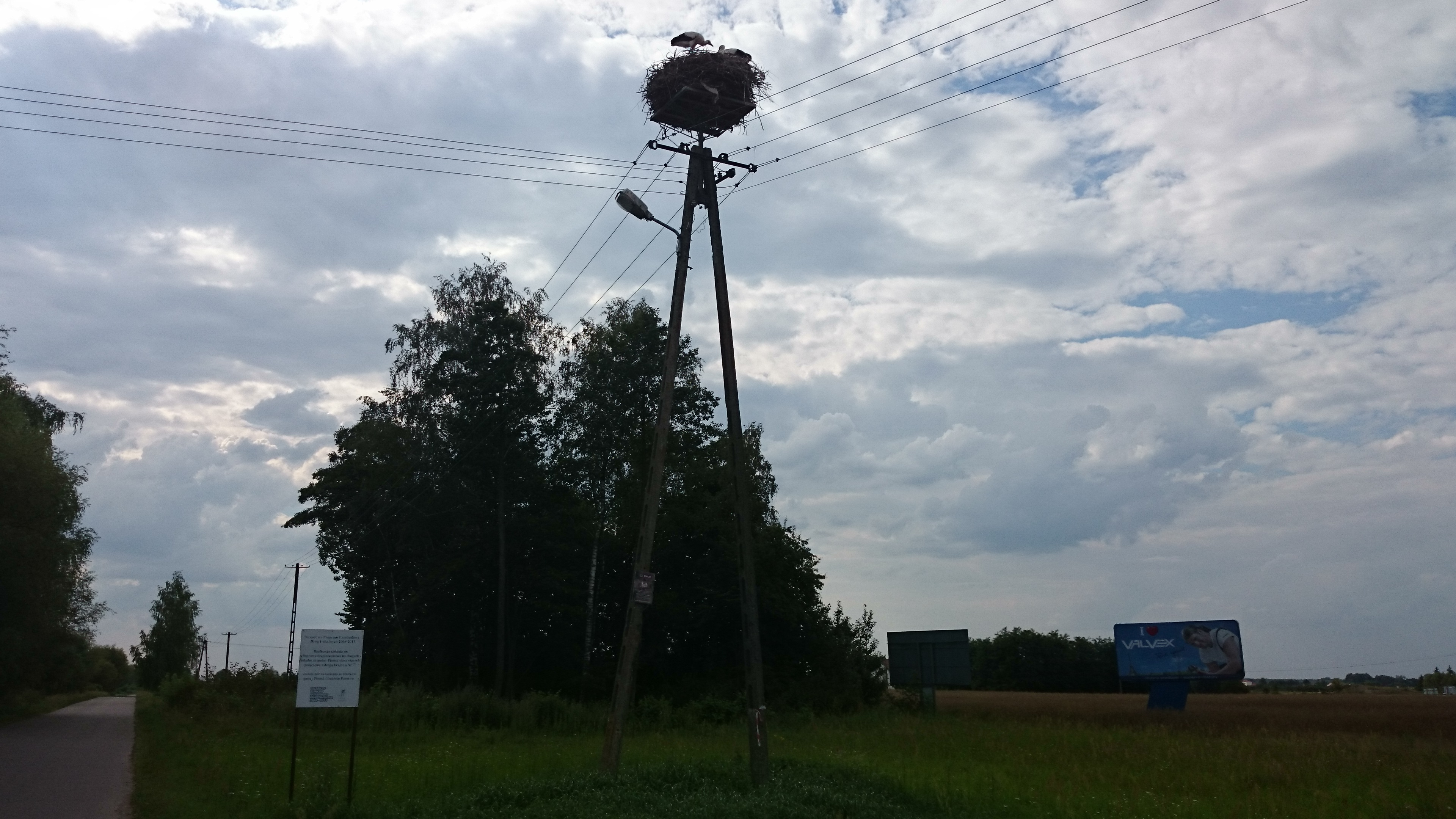 Bocianie gniazdo - droga krajowa nr 7 w okolicy wsi Cieciórki, gmina Płońsk